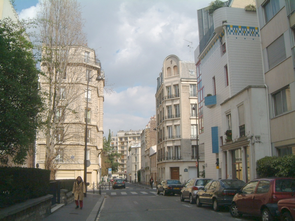 Photo perso de la rue Bezout, 75014 Paris